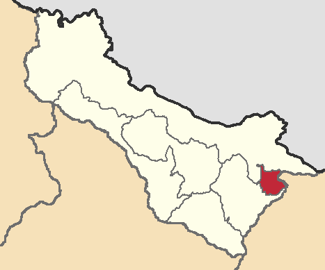 Mapa localizacor del cantón Bolívar, Carchi, Ecuador